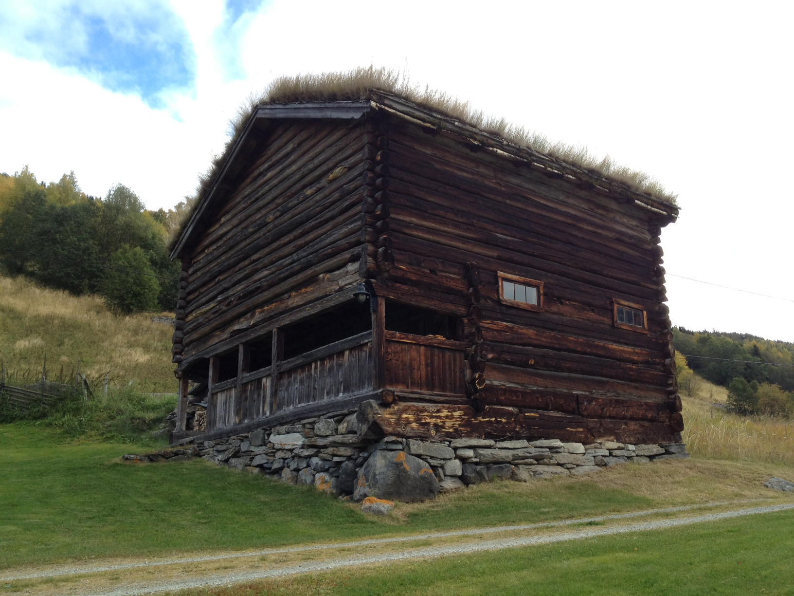 Stallen på gården Søre Harildstad i Heidal, Sel. Gården er totalfredet